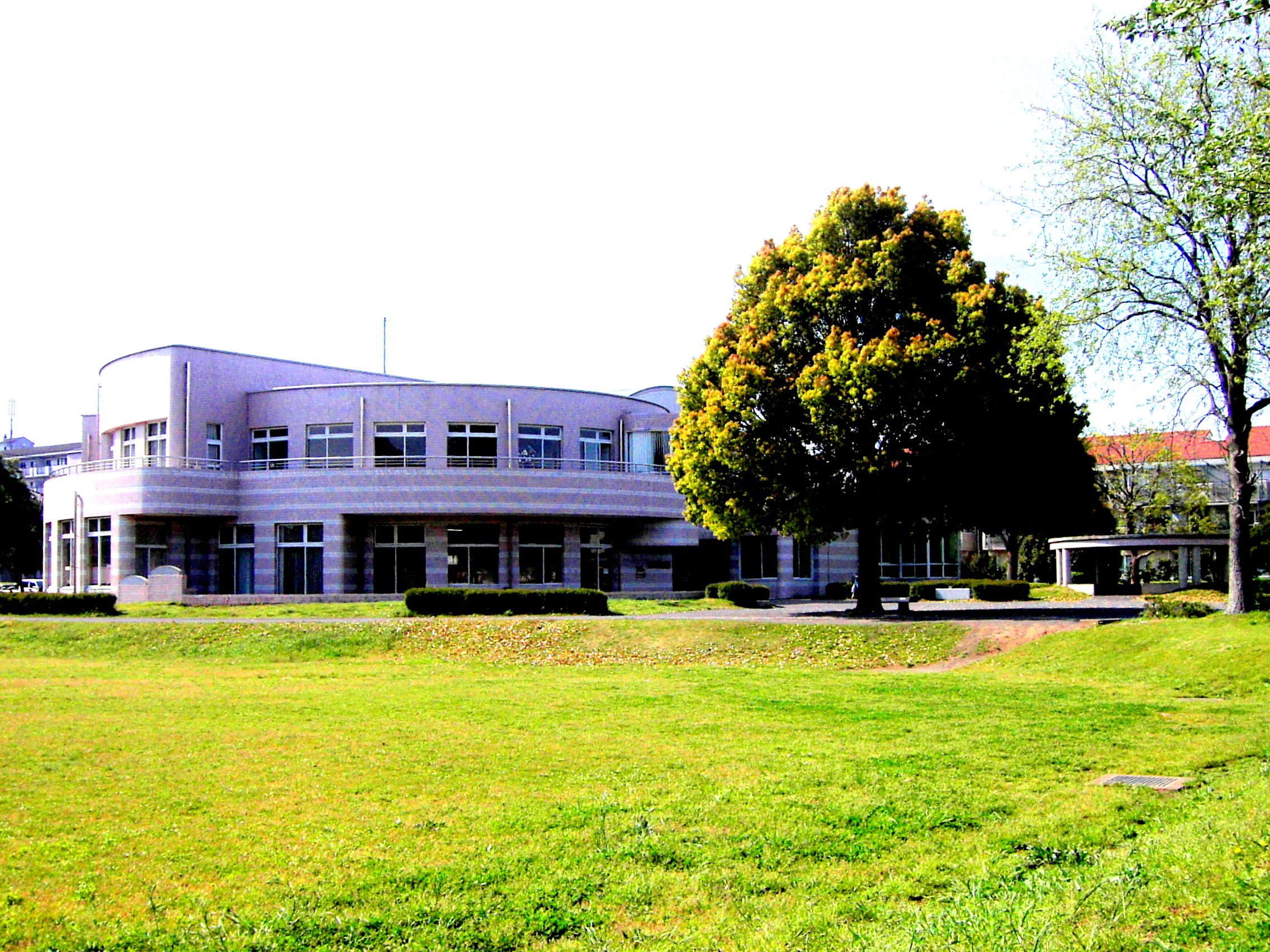 水戸市立東部図書館。